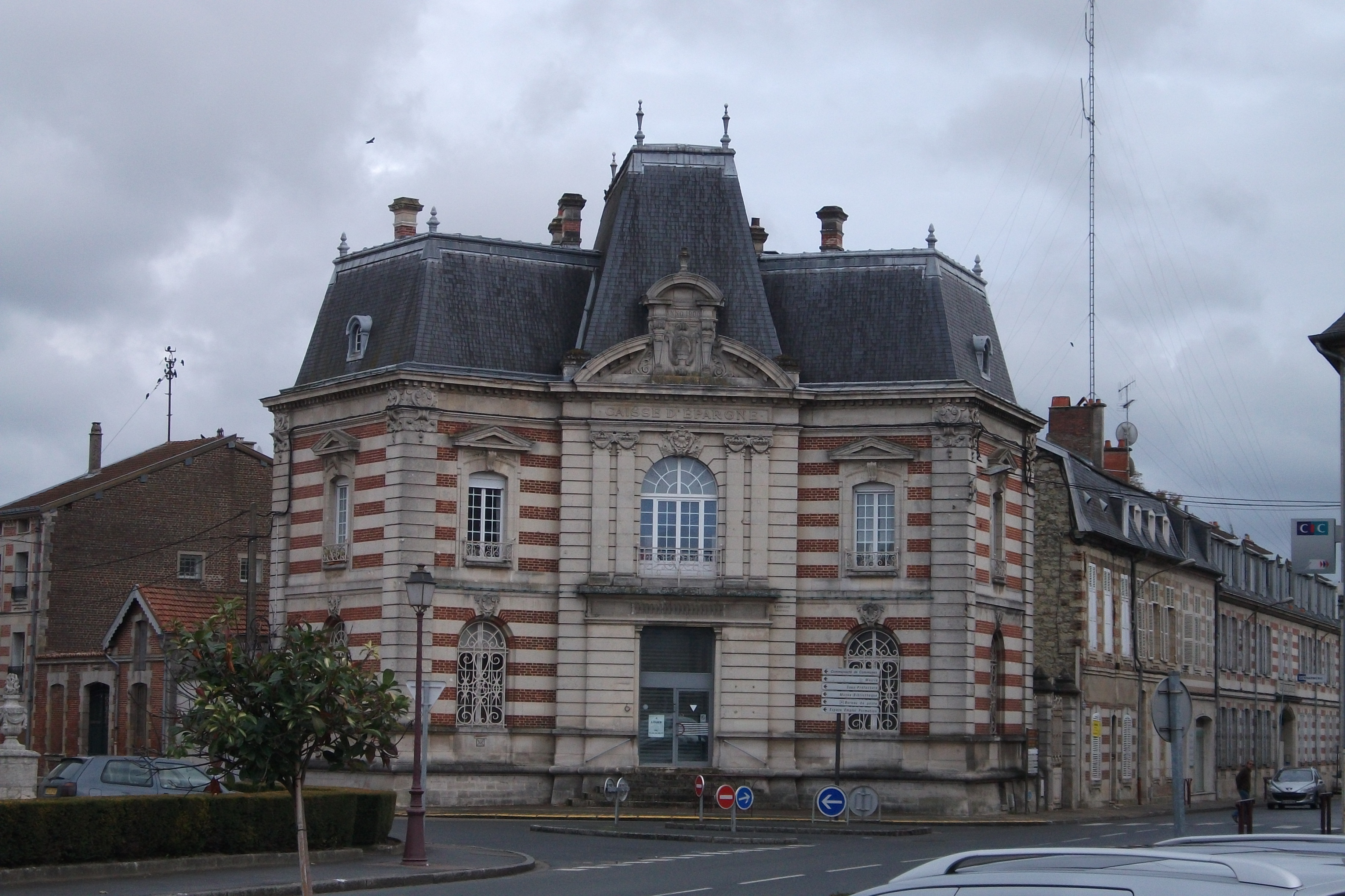 Sainte-Ménehould, place Leclerc, ancienne Caisse d'épargne.